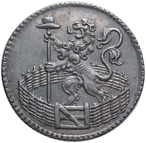 Hollandse duit. In de Hollandse tuin staat een Hollandse leeuw met vrijheidshoed op een lans. Zilver, 22 mm., 3,17 gram.